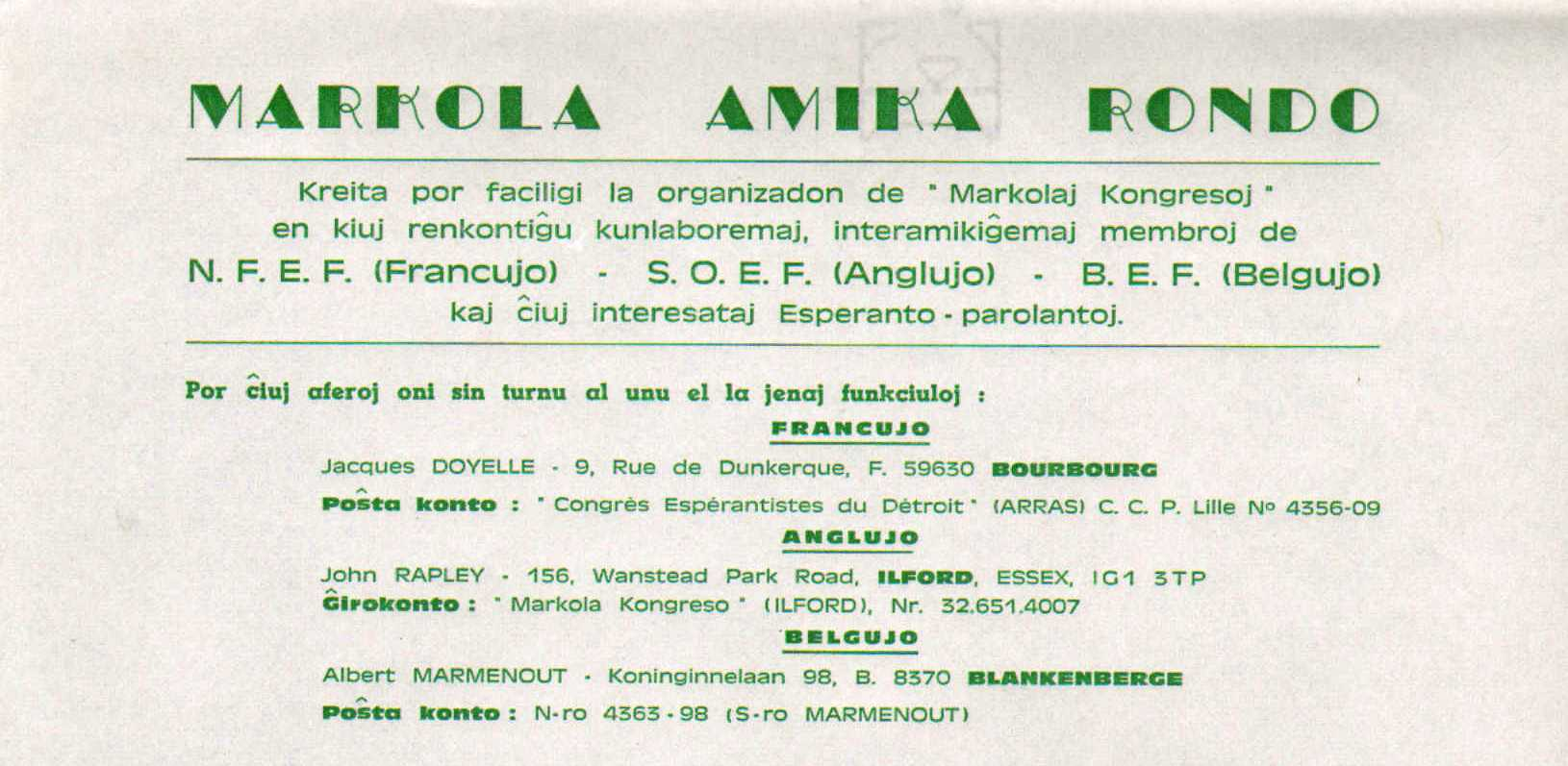 Leterkapo de 'Markola Amika Rondo'. Respondeculoj estis Jacques Doyelle, John Rapley kaj Albert Marmenout. Periodo necerta.